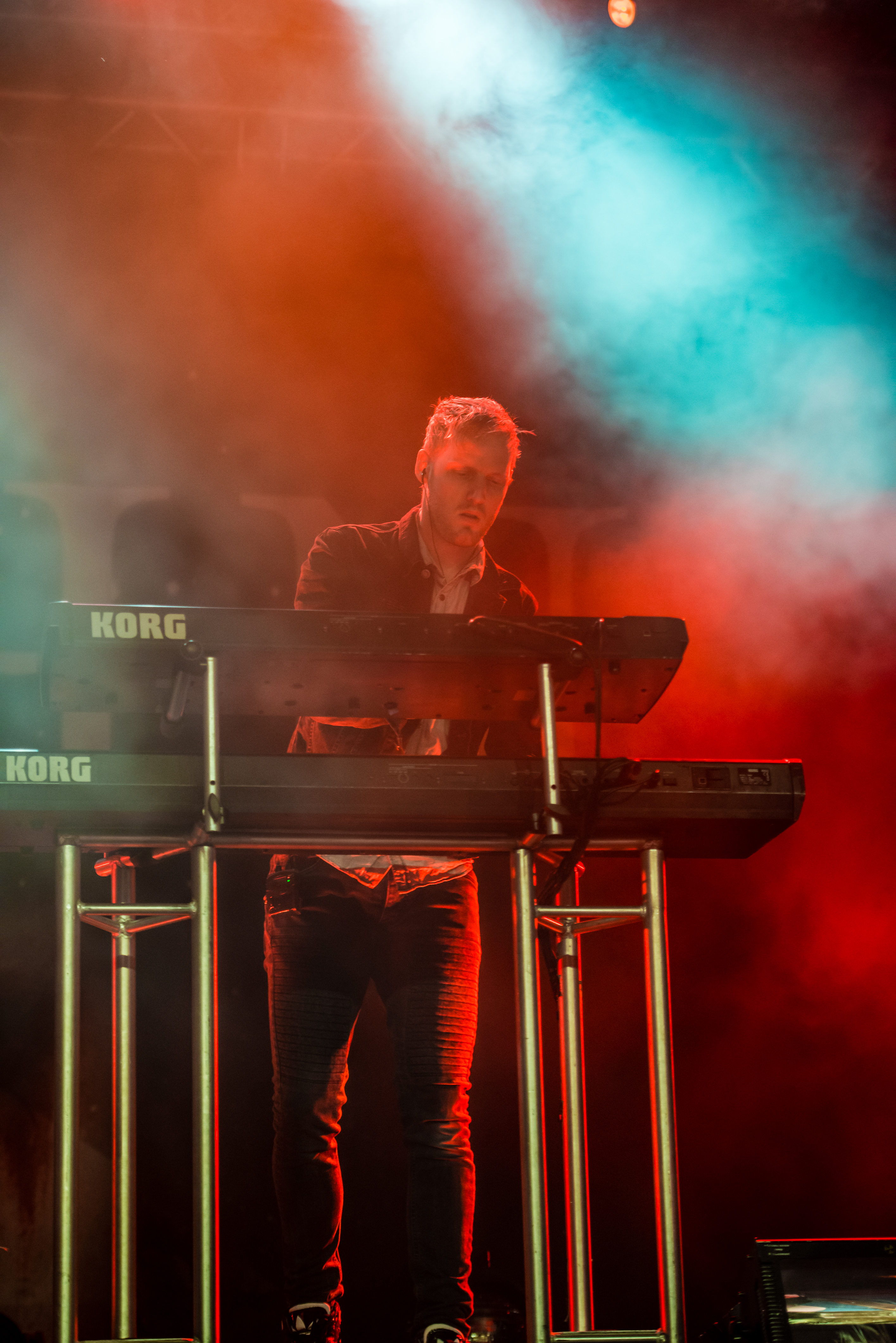 'Delain - Epic Metal Fest - Eindhoven'